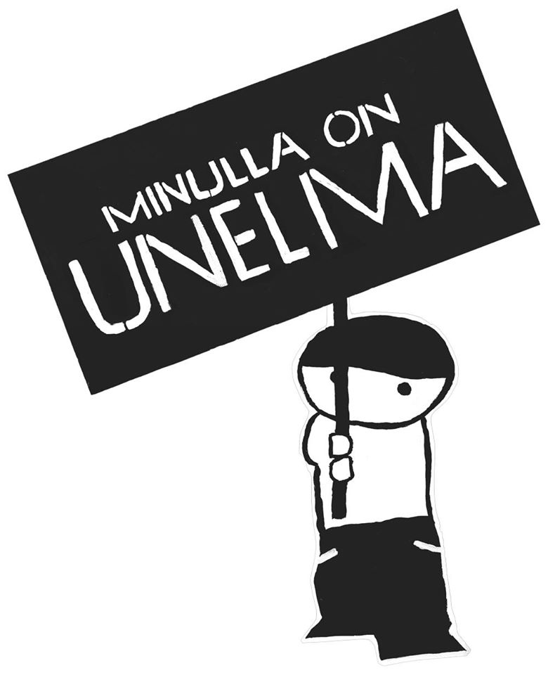 Siinä esiintyy ei luonnollinen henkilö, joka pitää kylttiä kädessään, jossa lukee "Minulla on unelma". Se oli Tampereen nuorisovaltuuston entinen logo